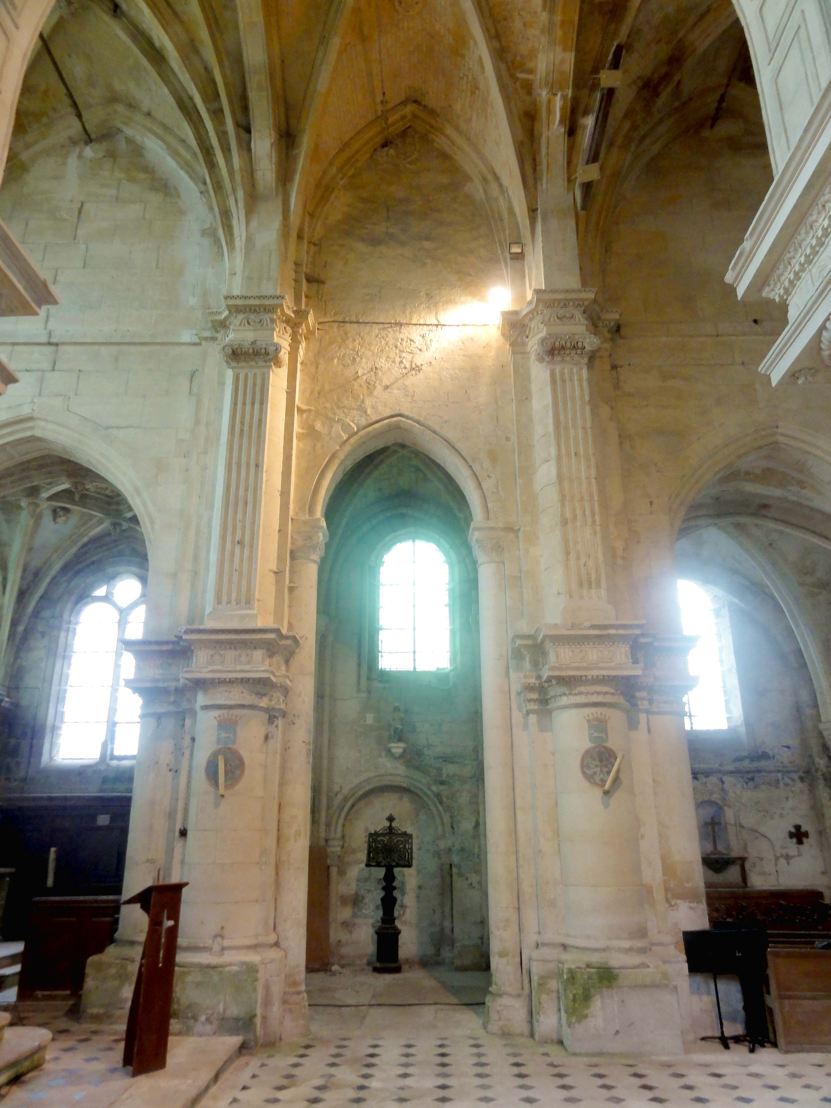 Vaisseau central, 5e travée côté sud - base du clocher.